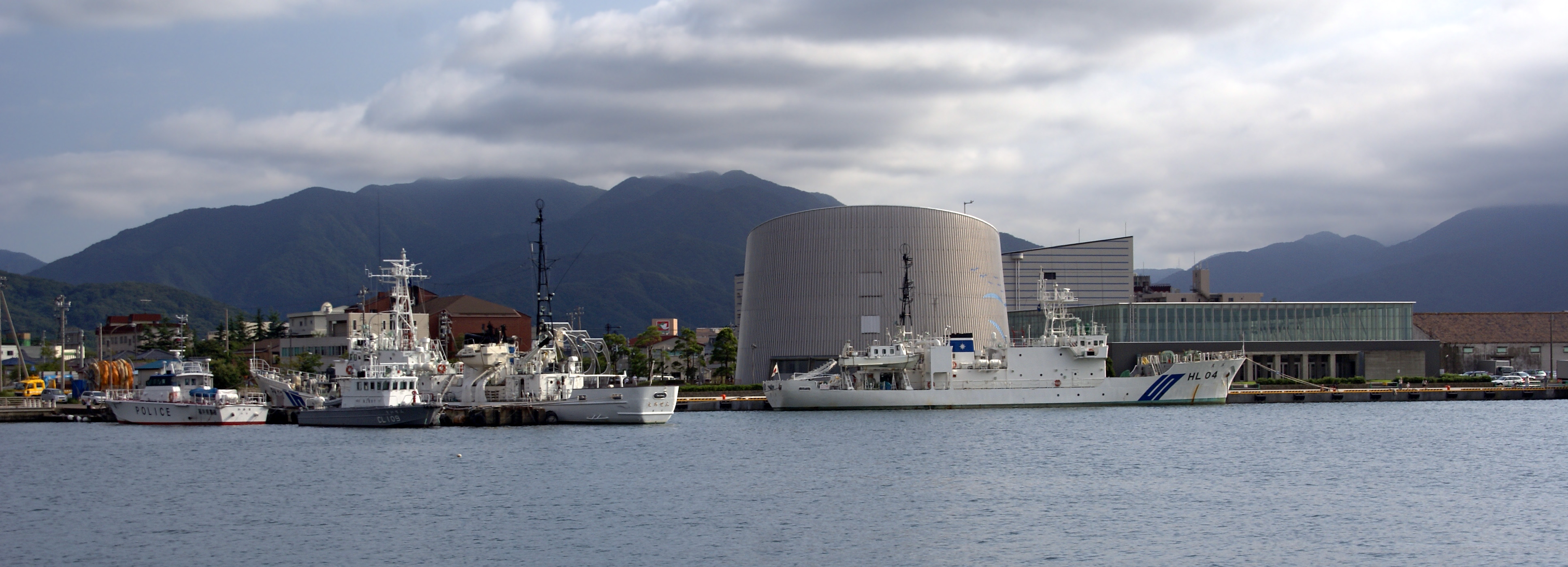 Tsuruga port in Tsuruga, Fukui prefecture, Japan